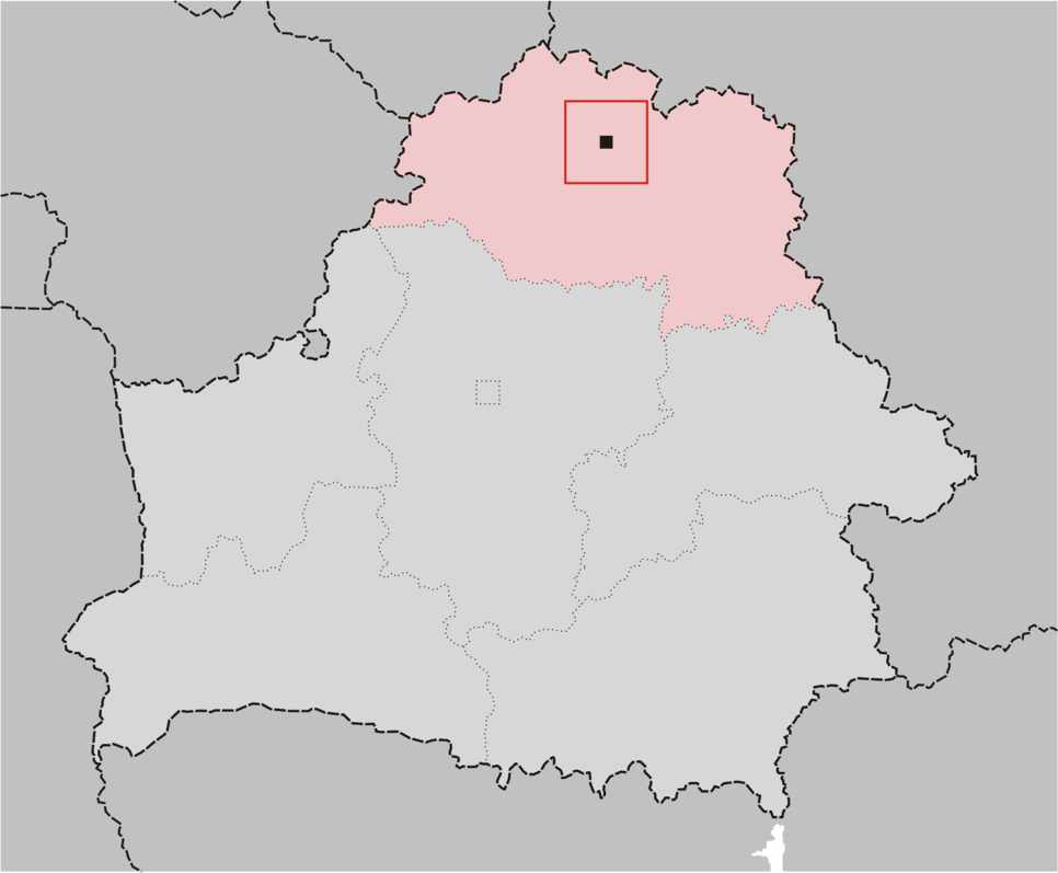 Lage der weißrussischen Stadt Polazk